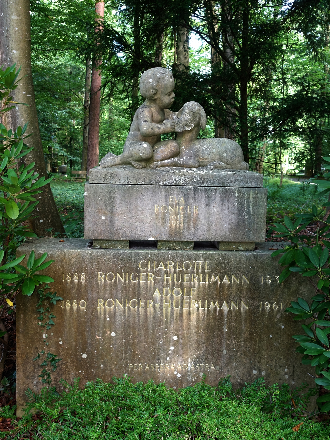 Adolf Roniger-Huerlimann (1880–1961) Feldschlösschen Brauereibesitzer, Familiengrab, Waldfriedhof Rheinfelden